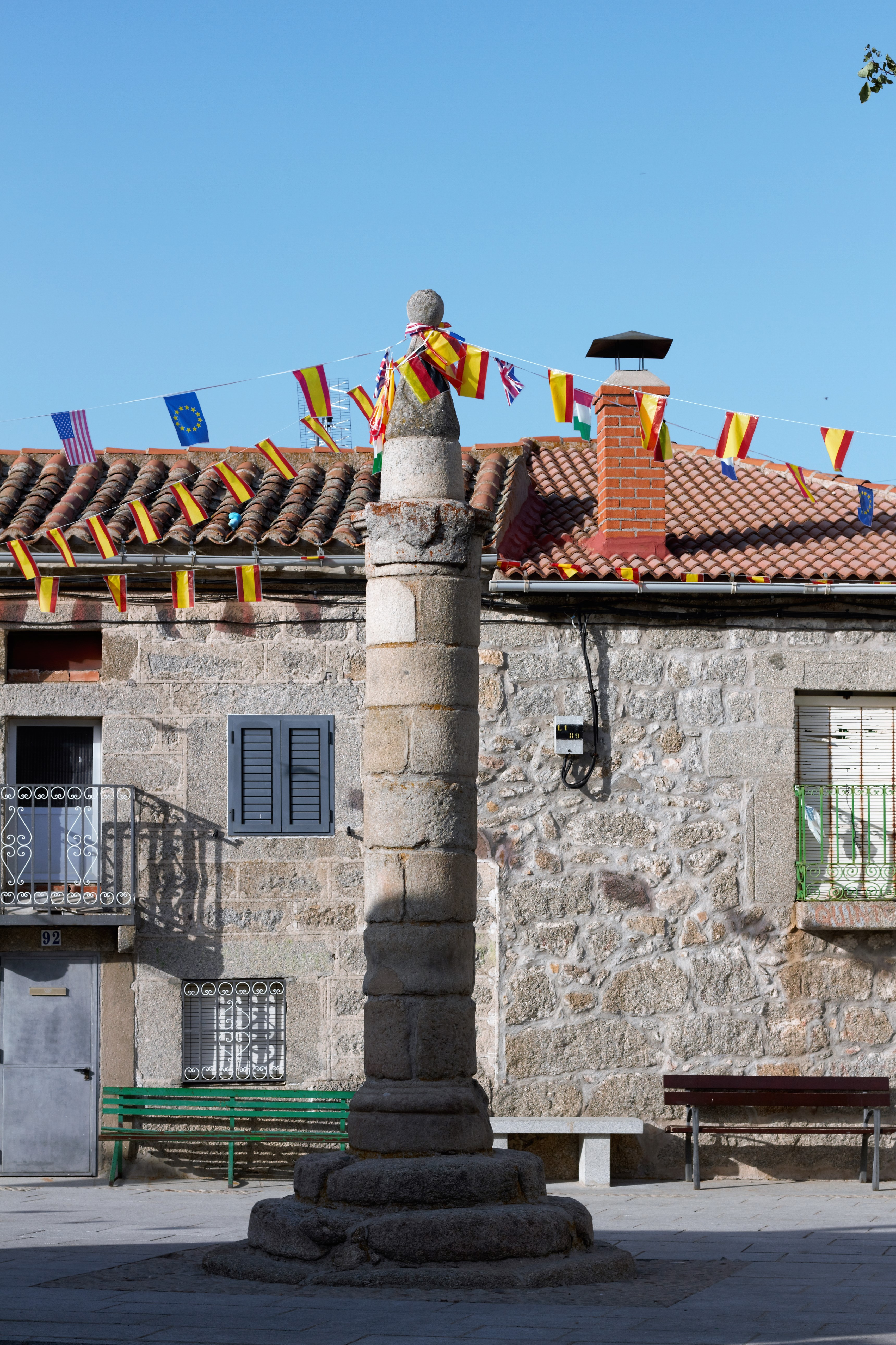 El Rollo monumento importante situado en la plaza del pueblo